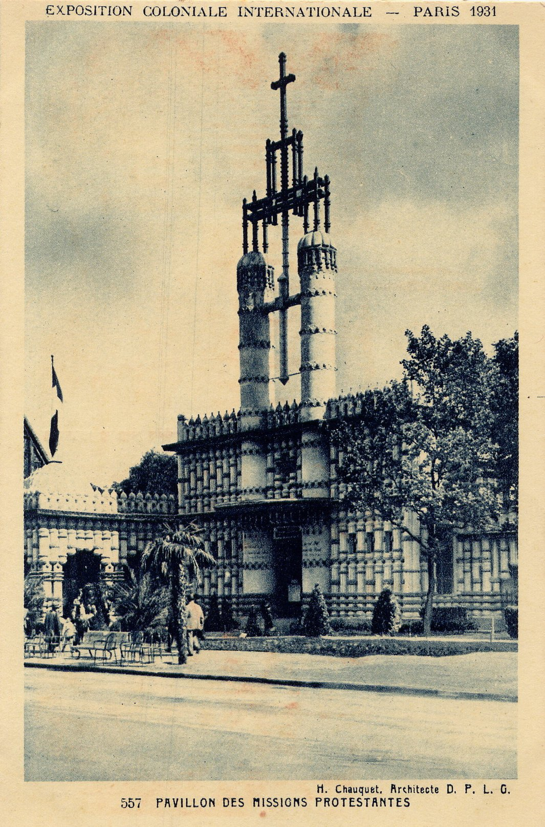 Pavillon des Missions Protestantes à l'Exposition Coloniale de PARIS en 1931